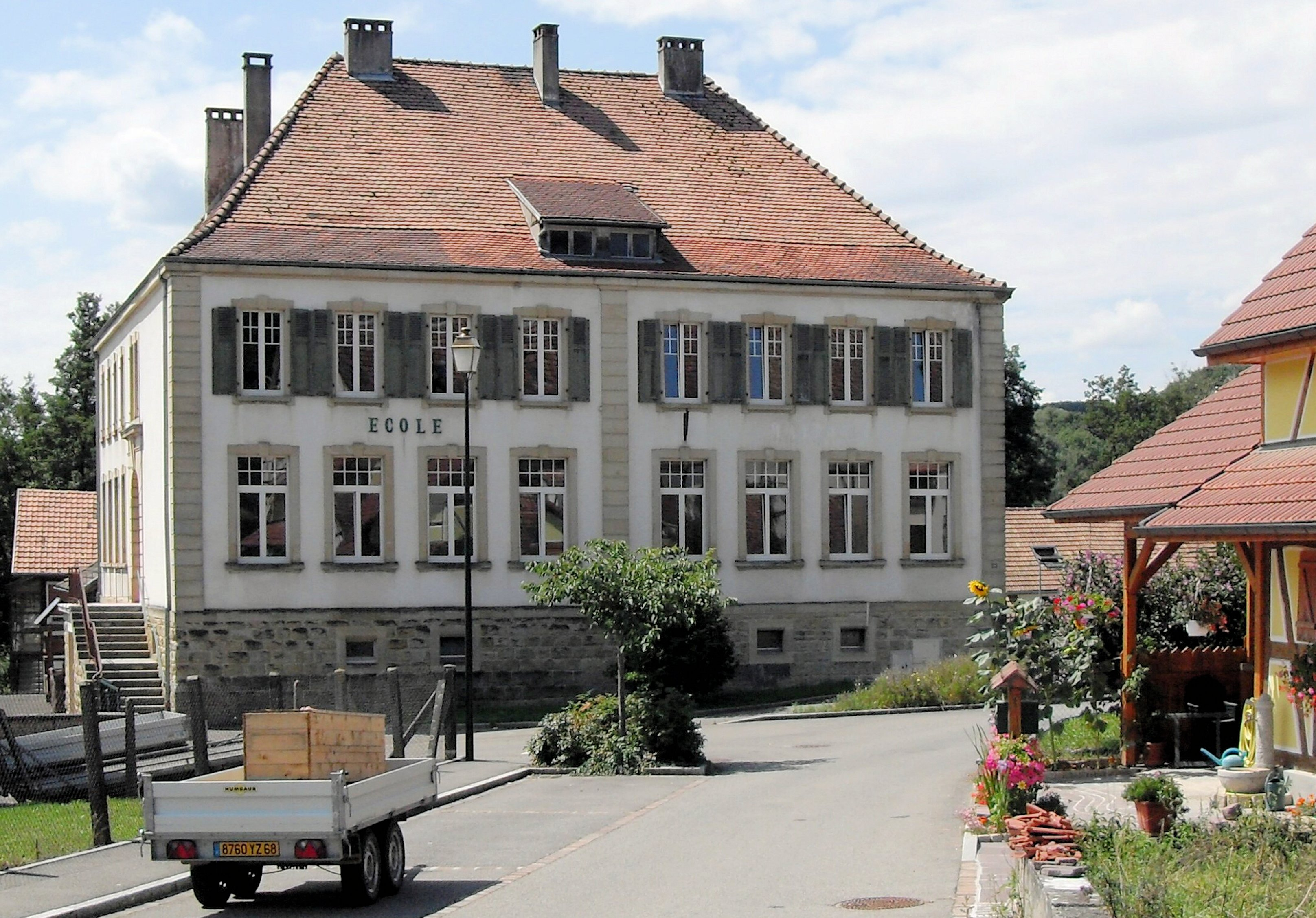 L'école de Roppentzwiller